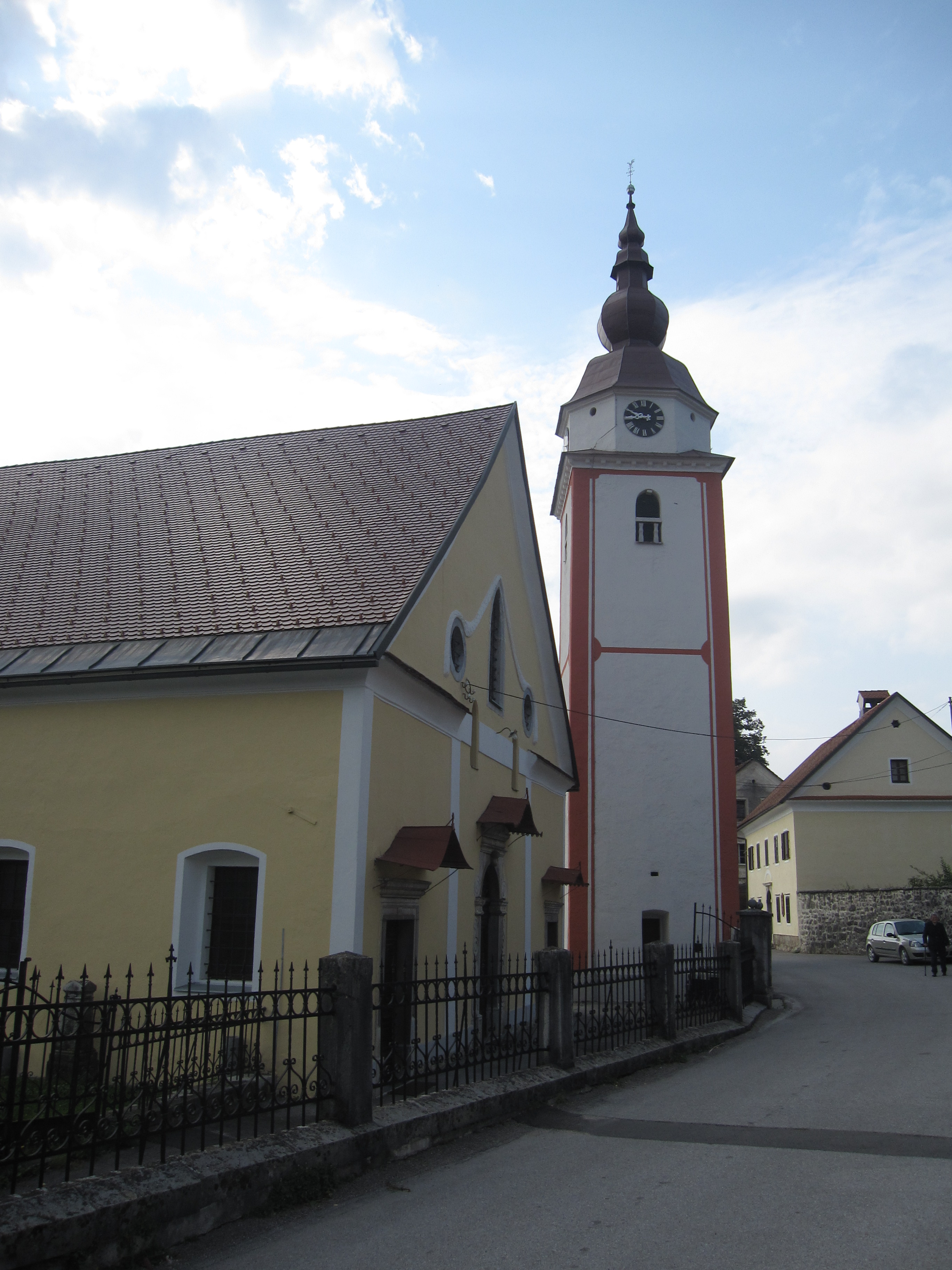 Church in Stari Trg